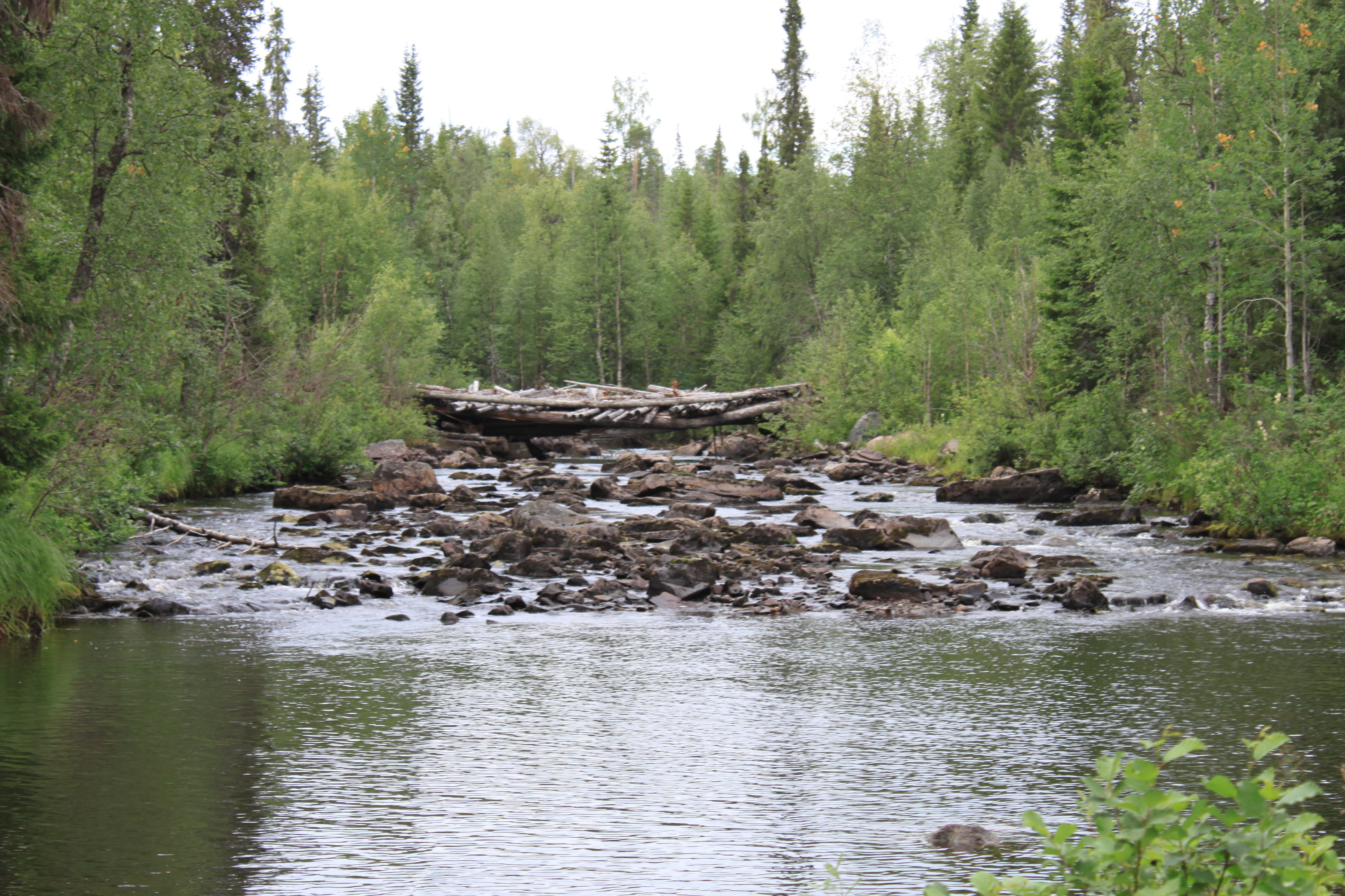 Мост через реку Кувжденьга